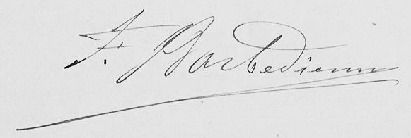 Signature manuscrite de Ferdinand Barbedienne.